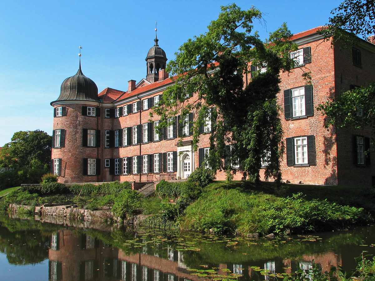 Beschreibung: Eutiner Schloss Fotograf: Darkone, 5. September 2005